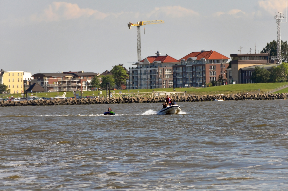 in den Häfen von Cuxhaven Mai 2012 )